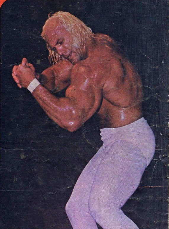 Billy Graham en couverture du magazine de catch Inside Wrestling de mars 1975